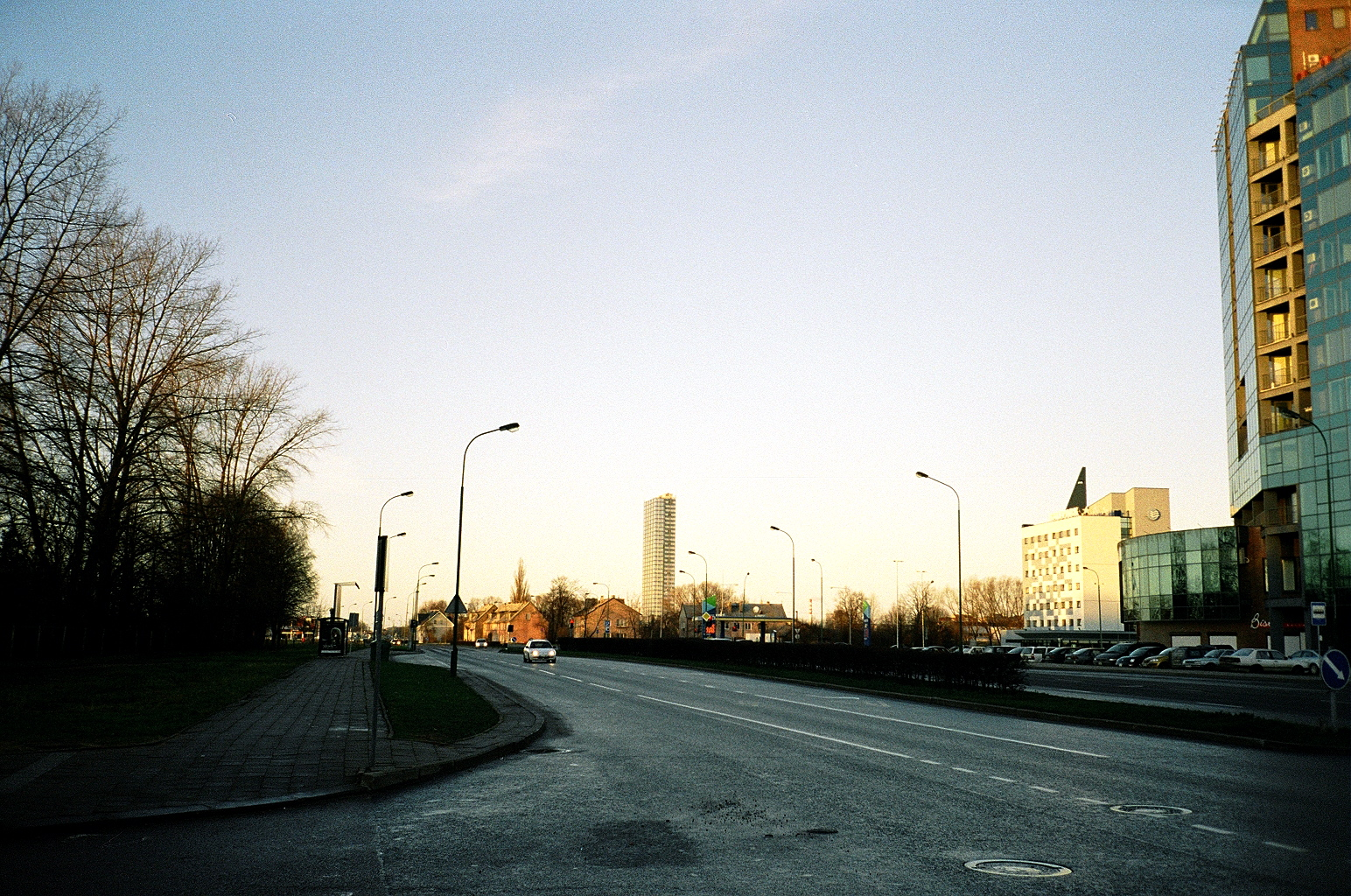 Minijos gatvė, tolumoje Gandrališkių "dangoraižis"